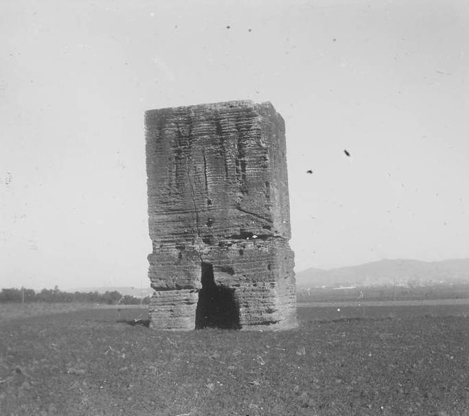 Nova vista de les restes d'una antiga torre sepulcral romana , formada per dos cossos , coneguda popularment com la Torre dels Moros .